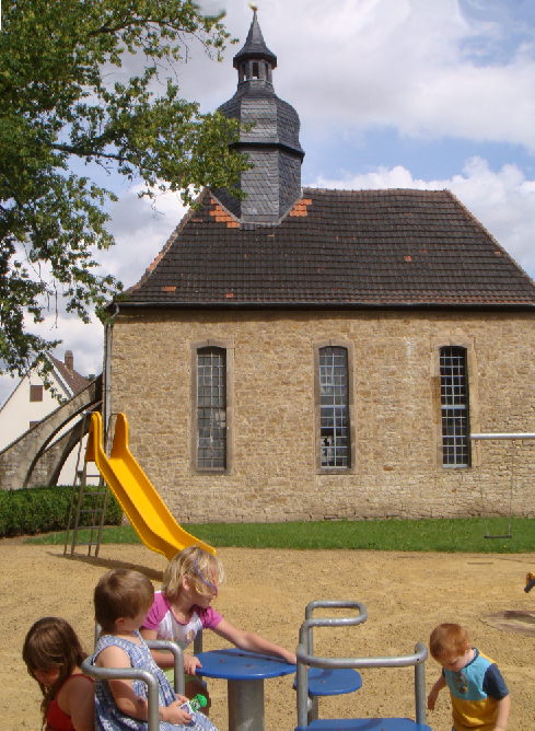 Kirche zu Darnstedt